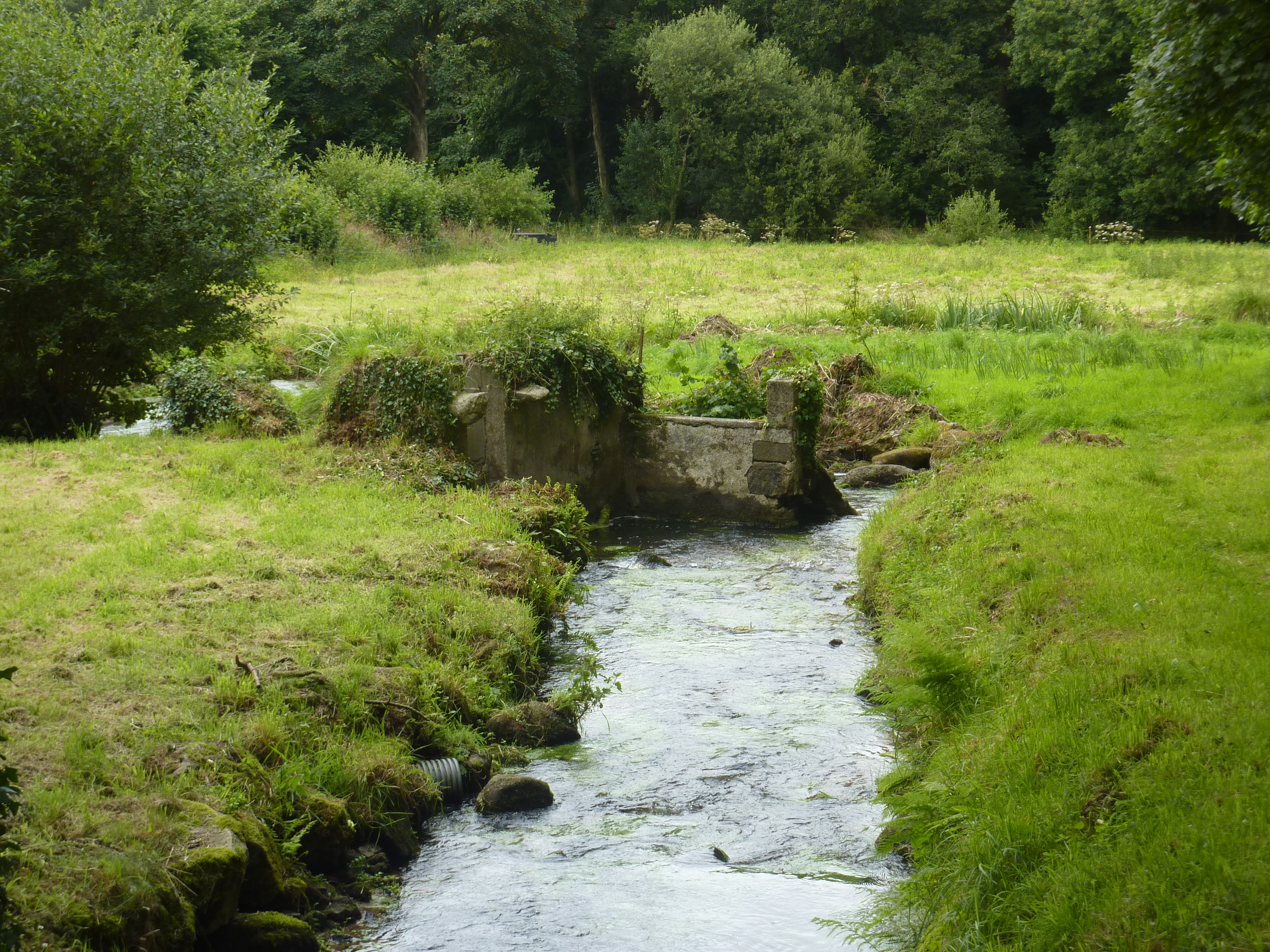 Le Drennec : l'Aber Benoît (partie amont) près de la chapelle de Loc-Mazé (Locmazé).